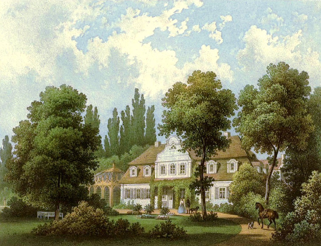 Schloss Alt-Tomysl, Kreis Buk, Provinz Posen